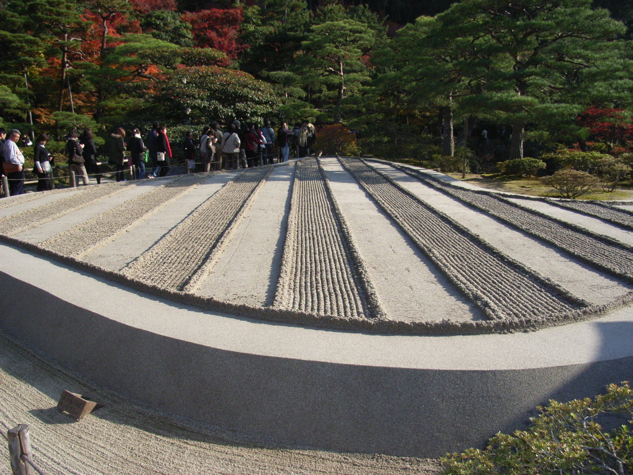 慈照寺の銀沙灘